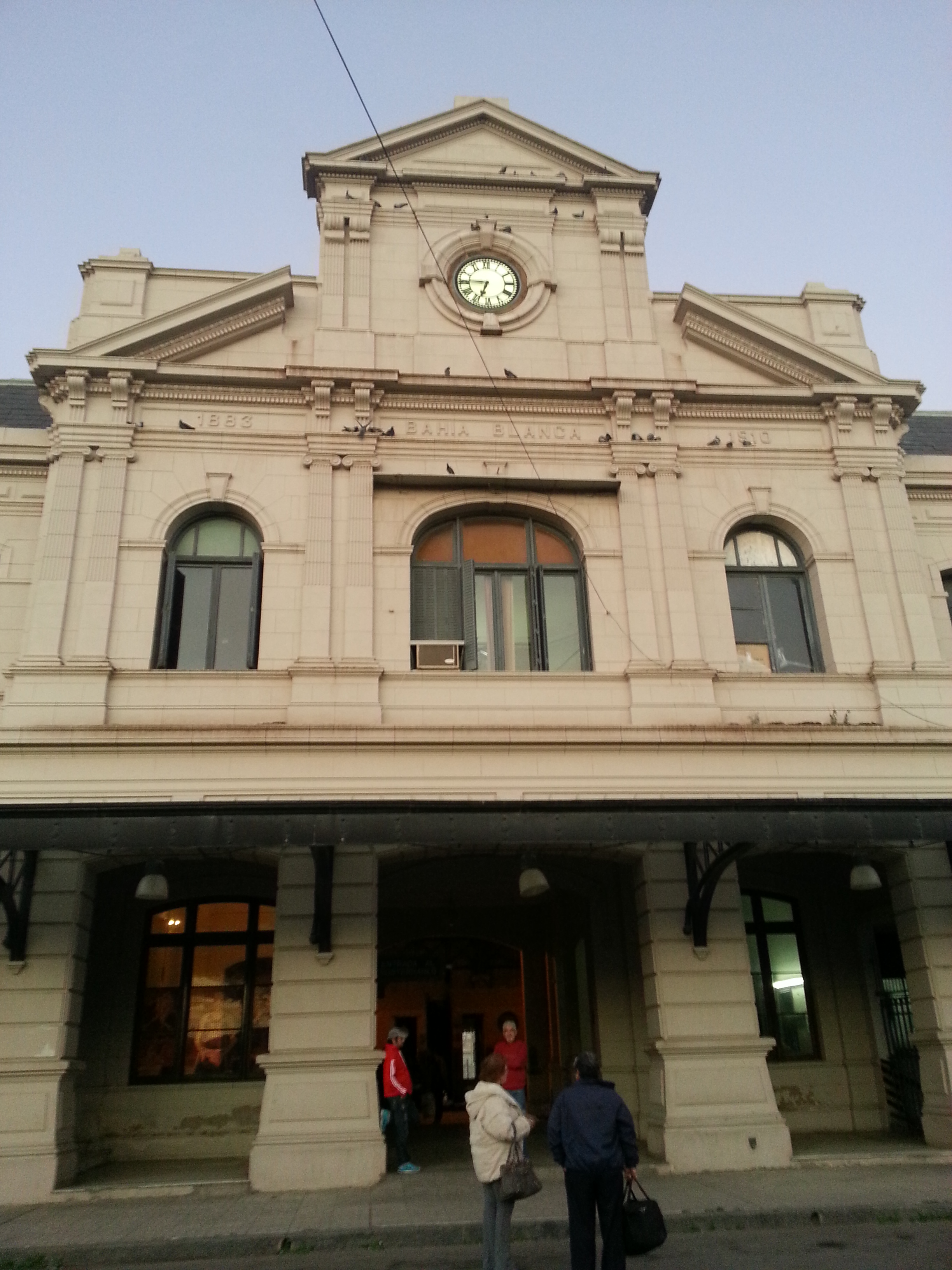 Frente de la estación Bahía Blanca Sud (Agosto 2014)